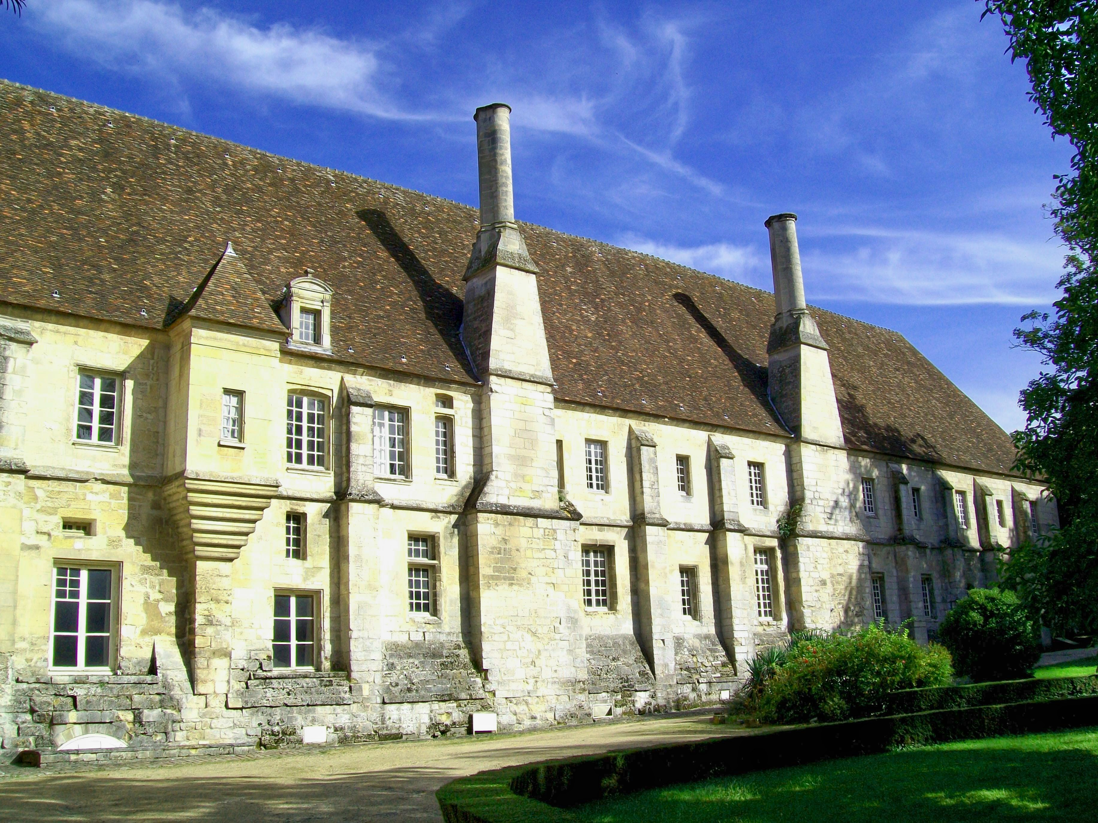 L'aile occidentale de l'abbaye, qui hébergeait les dortoirs.